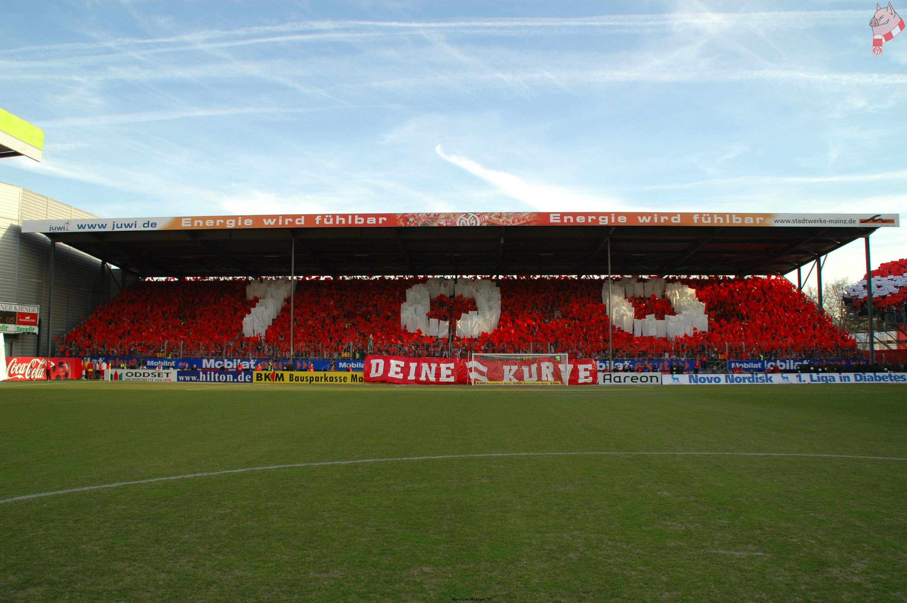 Jubiläums-Choreographie des 1. FSV Mainz 05 (Ausschnitt)